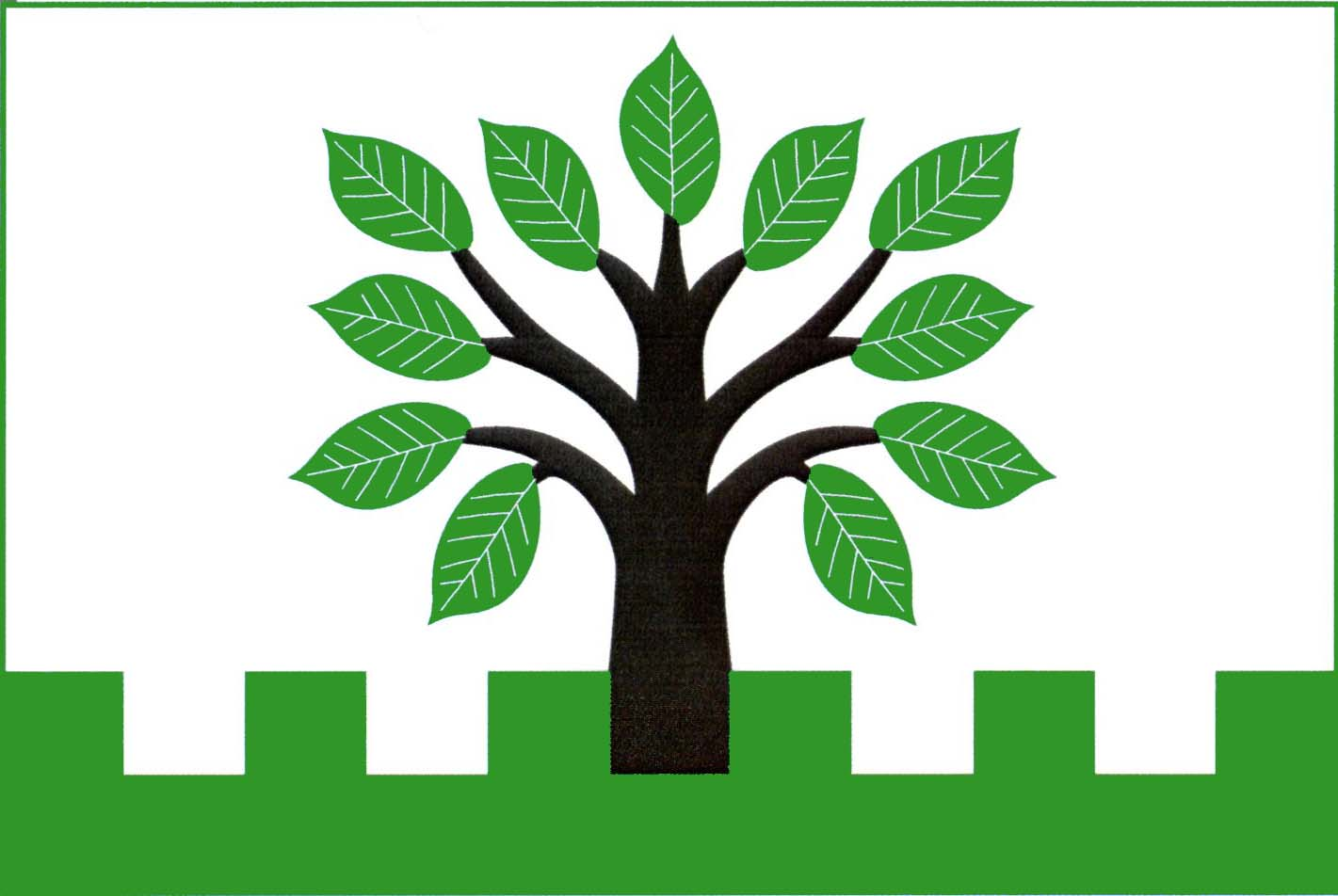 Vlajka obce Jilem (okres Havlíčkův Brod)